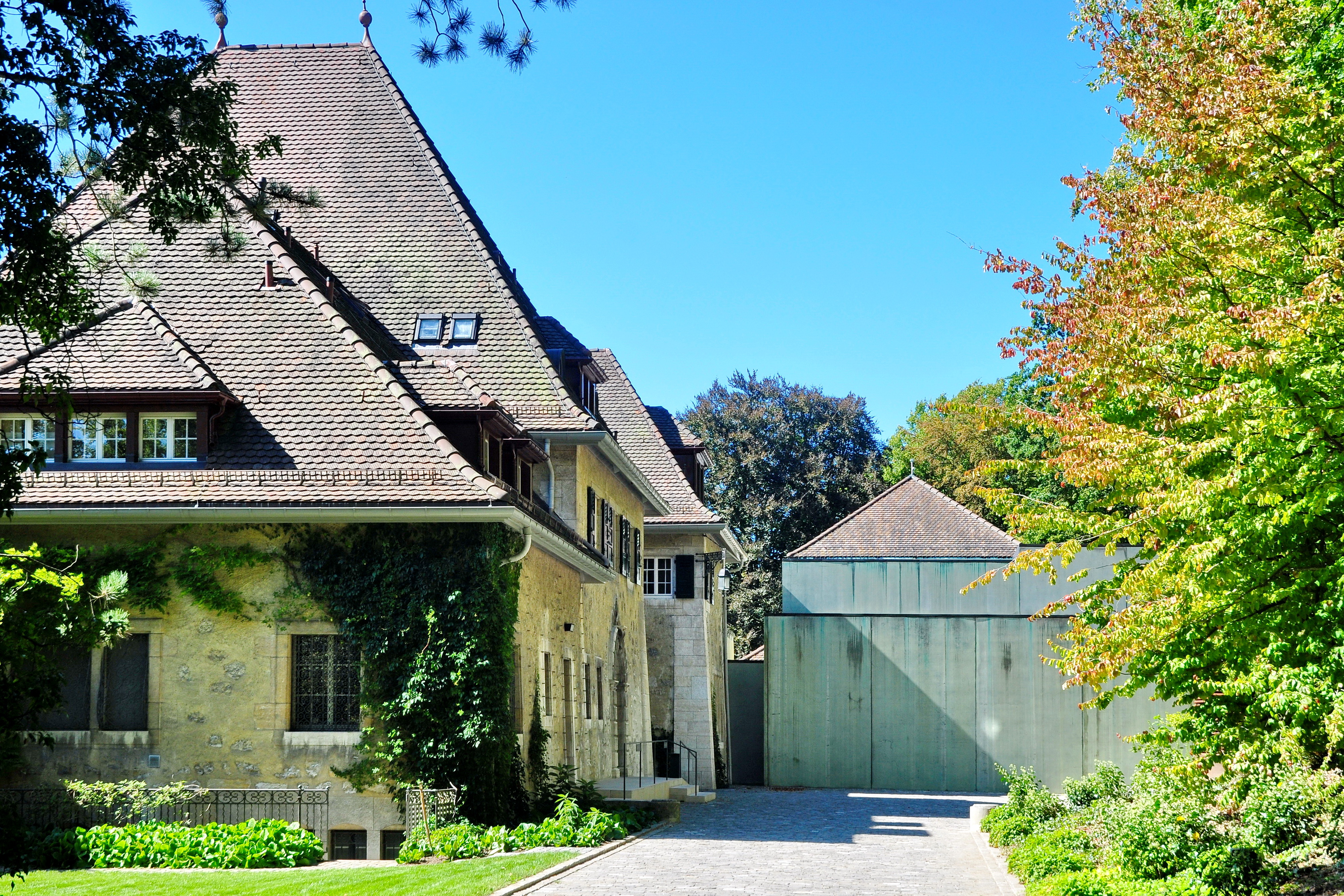 Eidgenössische Gottfried Keller-Stiftung im Museum Oskar Reinhart «Am Stadtgarten», Haldenstrasse 95 in Winterthur (Switzerland)